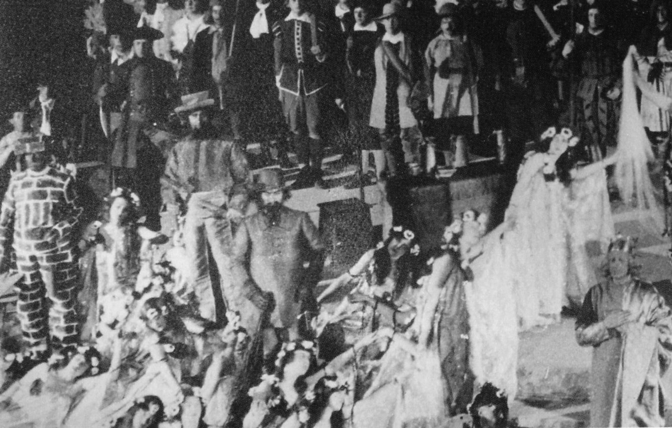 Lustspelet Taklagsölet vid Stadshusets invigning 1923